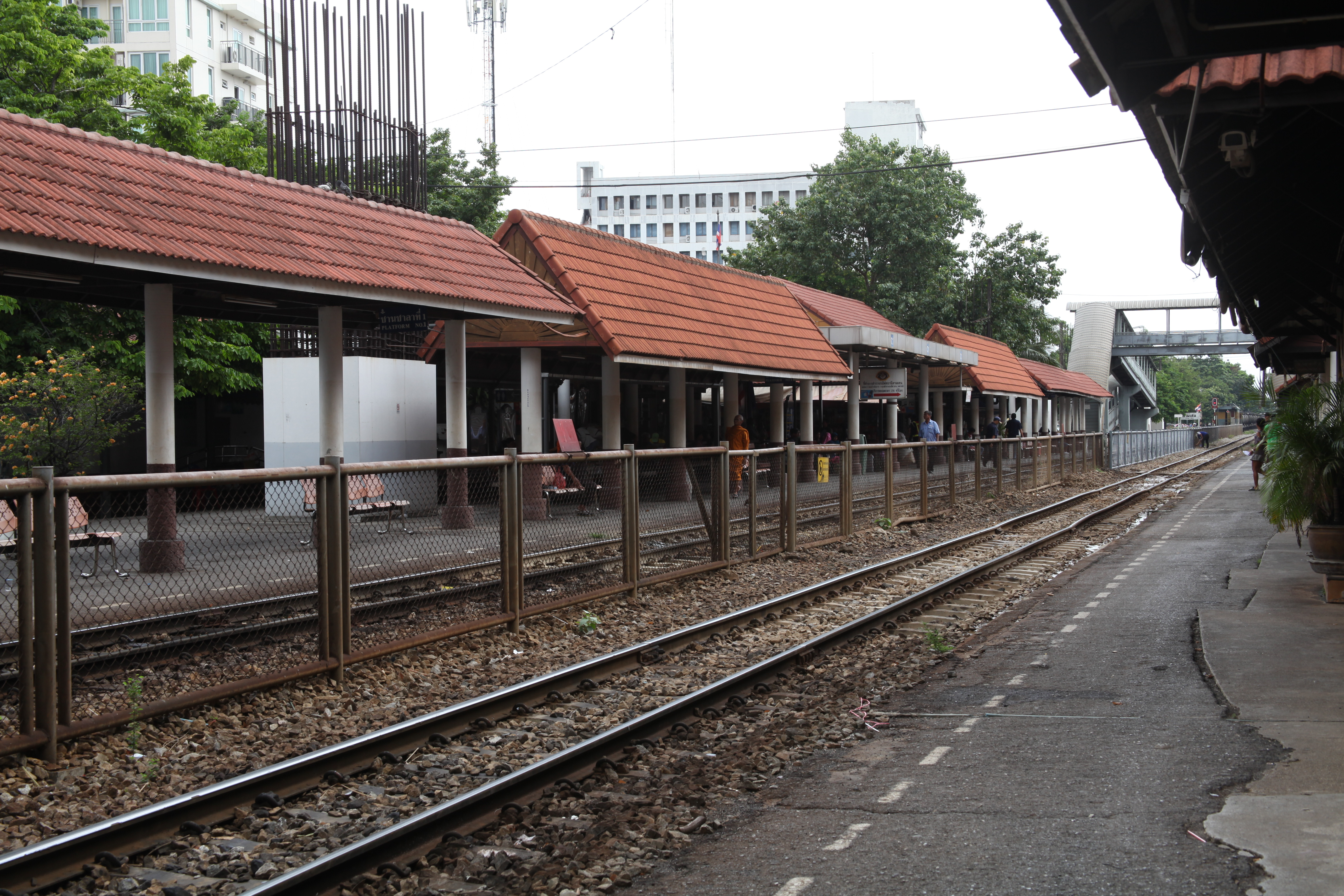 サムセン駅構内